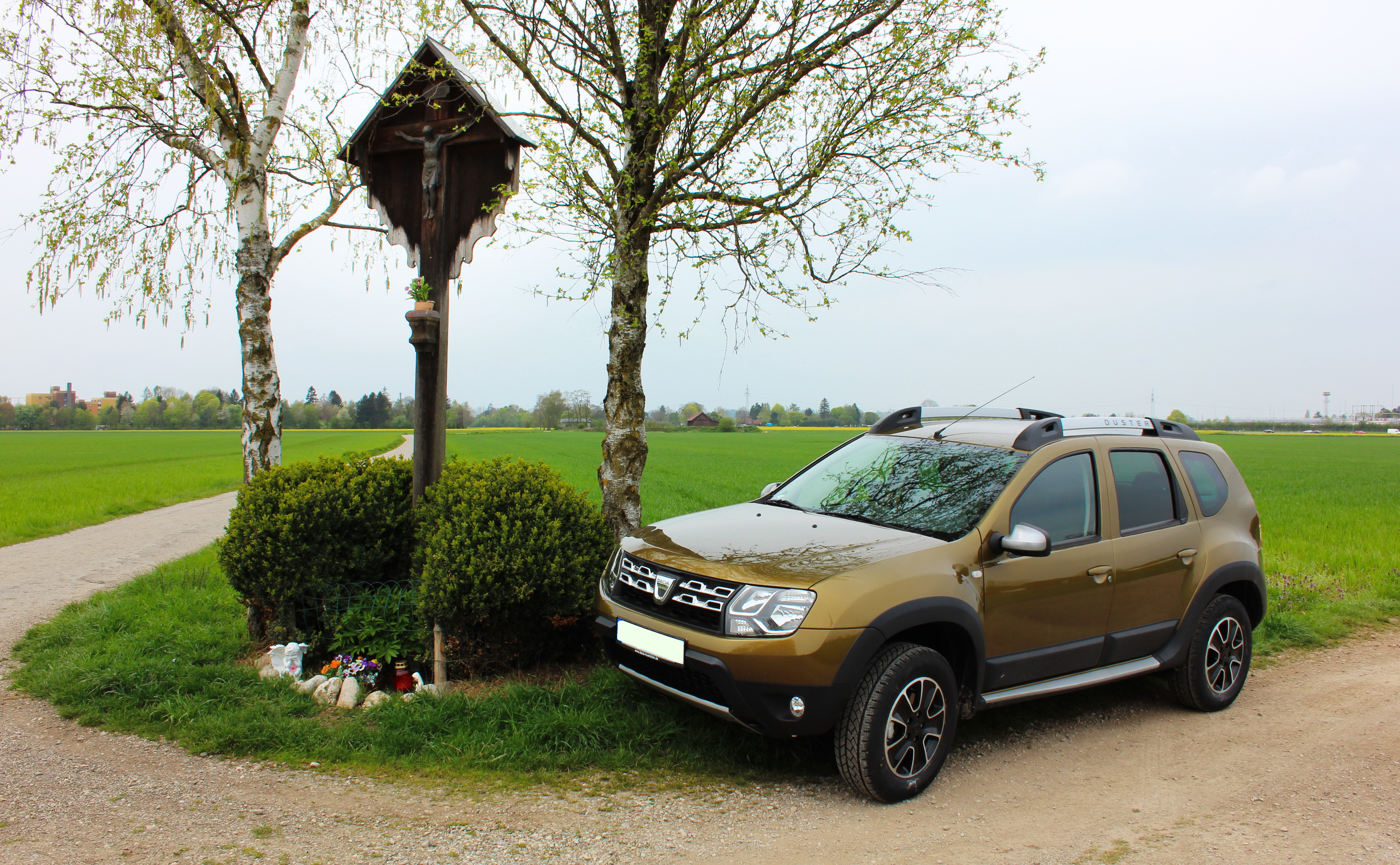 Dacia Duster Urban Explorer in Altai Grün.